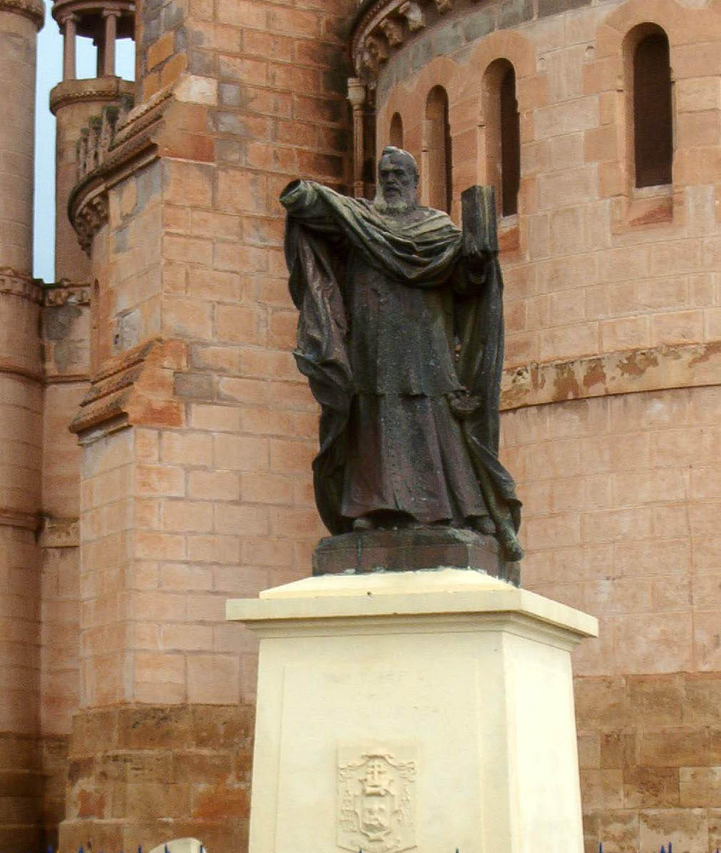 statue du cardinal Lavigerie à Alger à qui l'on a enlevé la croix qu'il tenait en main